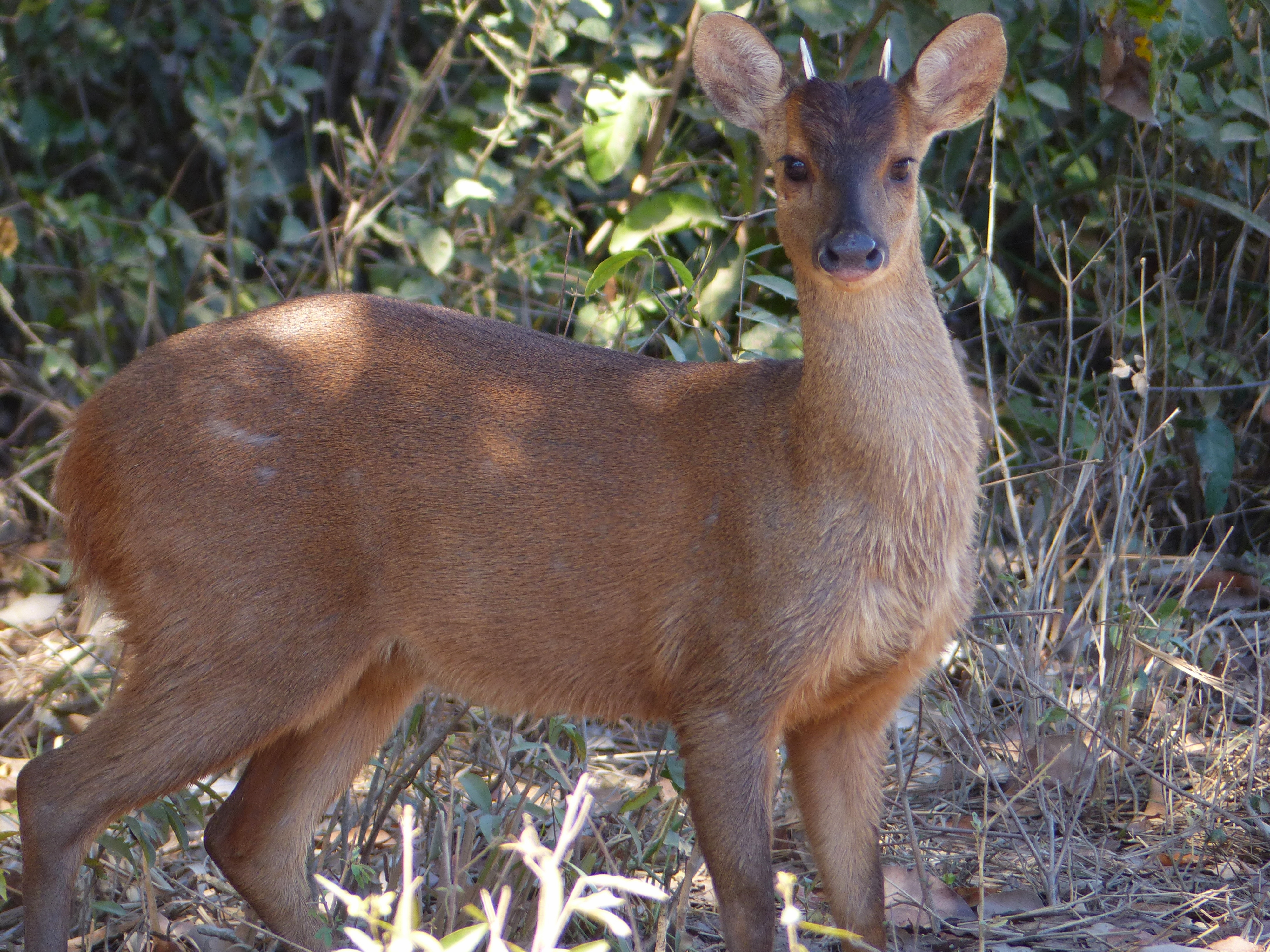 Transpantaneira, Poconé, Mato Grosso, BRAZIL